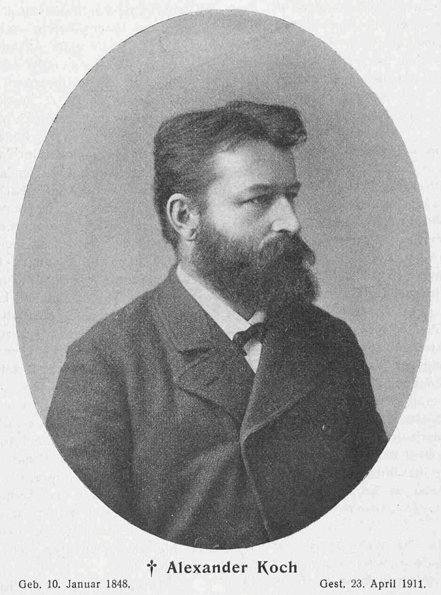 Portrait von Alexander Koch, vor 1885, aus dem Nekrolog (1911)